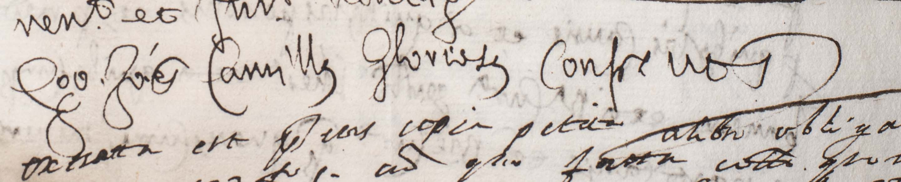 estratto